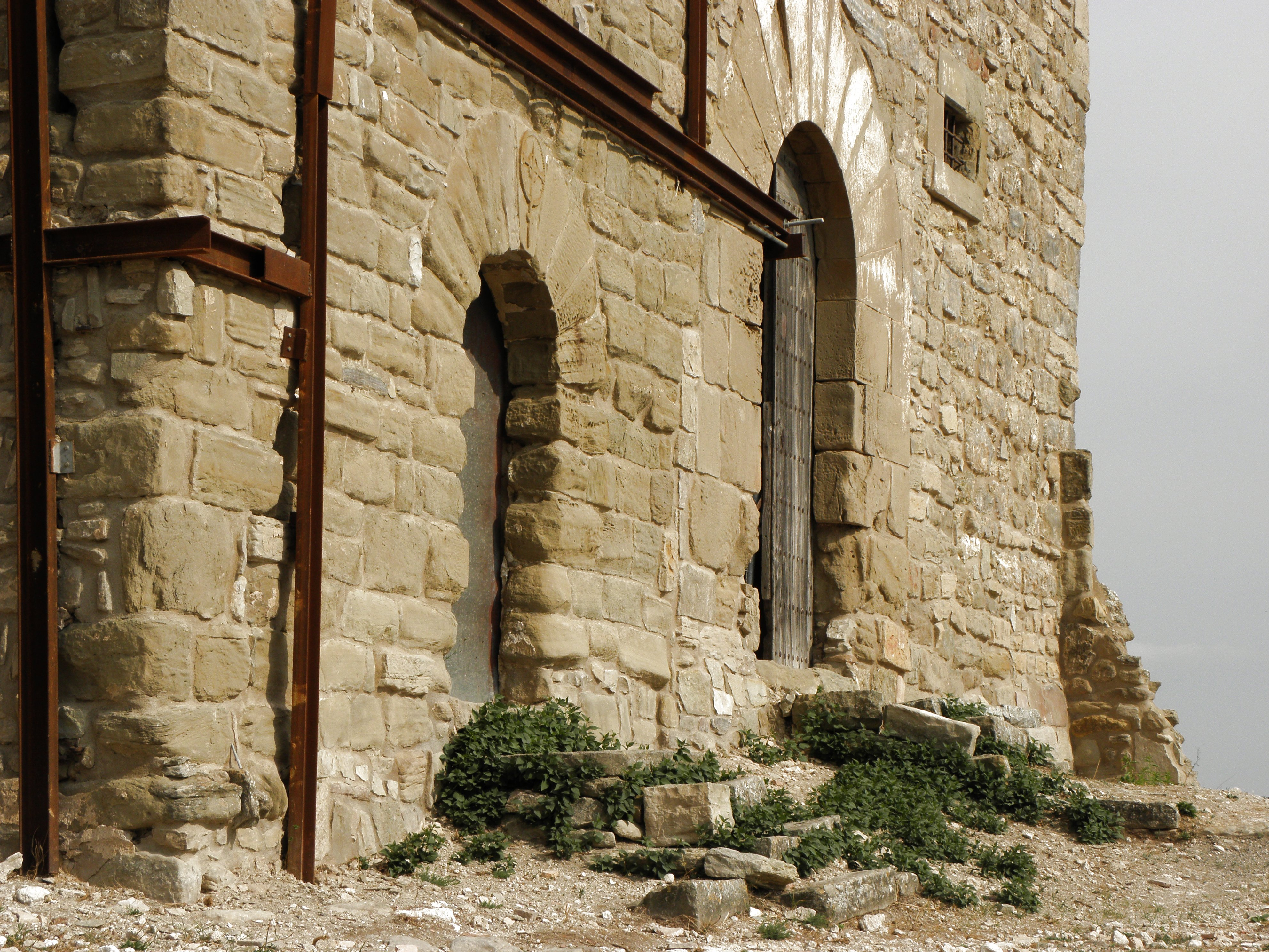 El castell d'Enfesta (municipi de la Molsosa, Solsonès). Els portals d'accès al castell (gran) i a l'església de Santa Maria (petita).